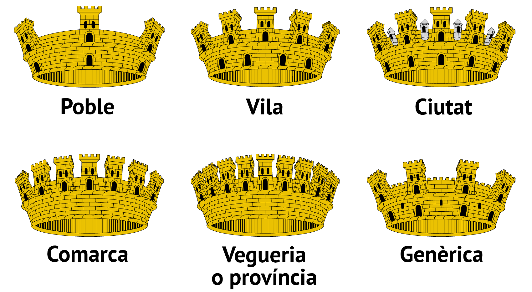 Corones murals. Les cinc primeres estan regulades per la Generalitat de Catalunya d'acord amb la SCGHSVN, primer mitjançant el Decret 139/2007, amb el qual es regula la denominació, els símbols i el registre d'ens locals de Catalunya, amb data de publicació de 28 de juny del 2007.